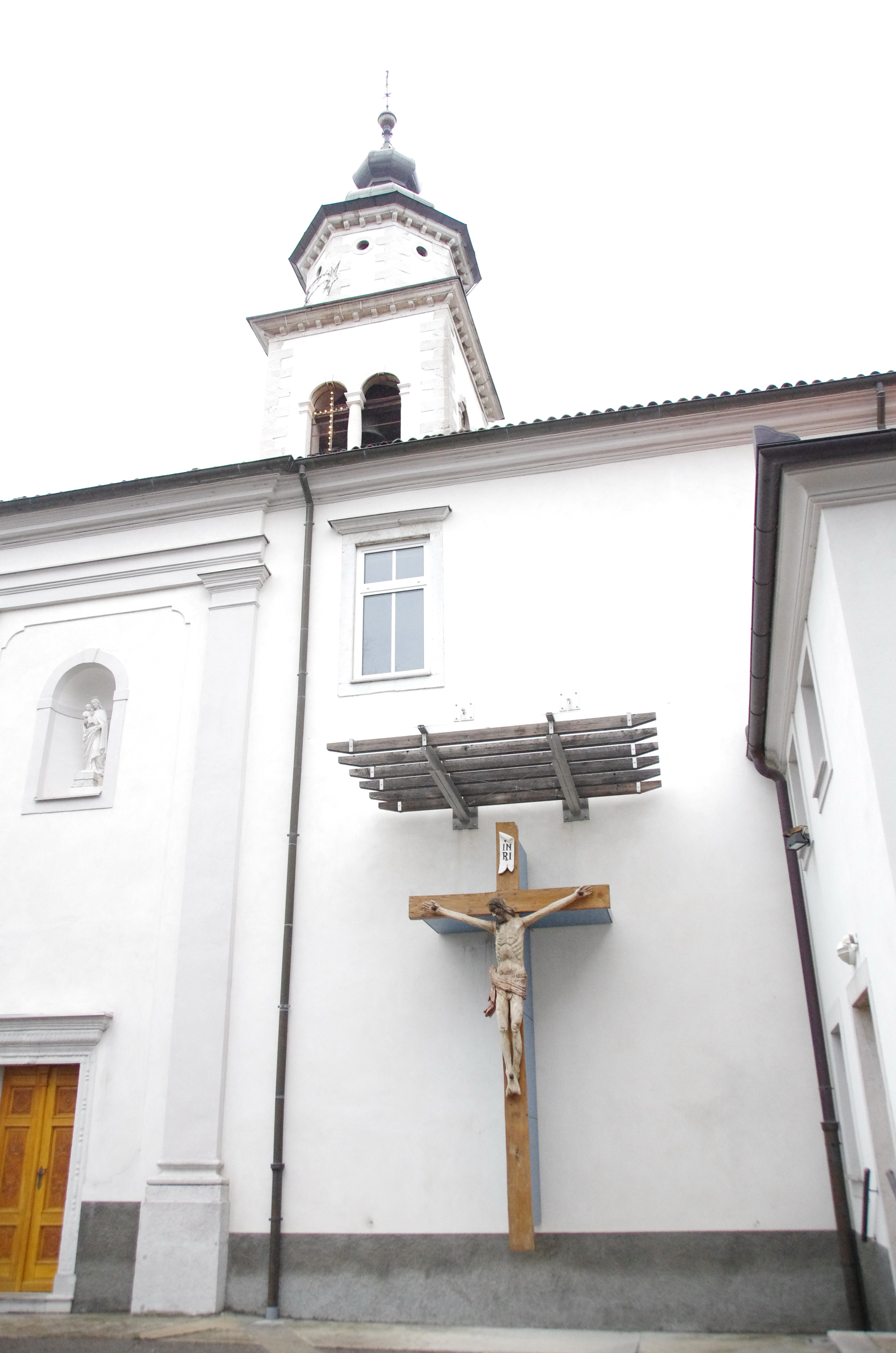 Ajdovščina church